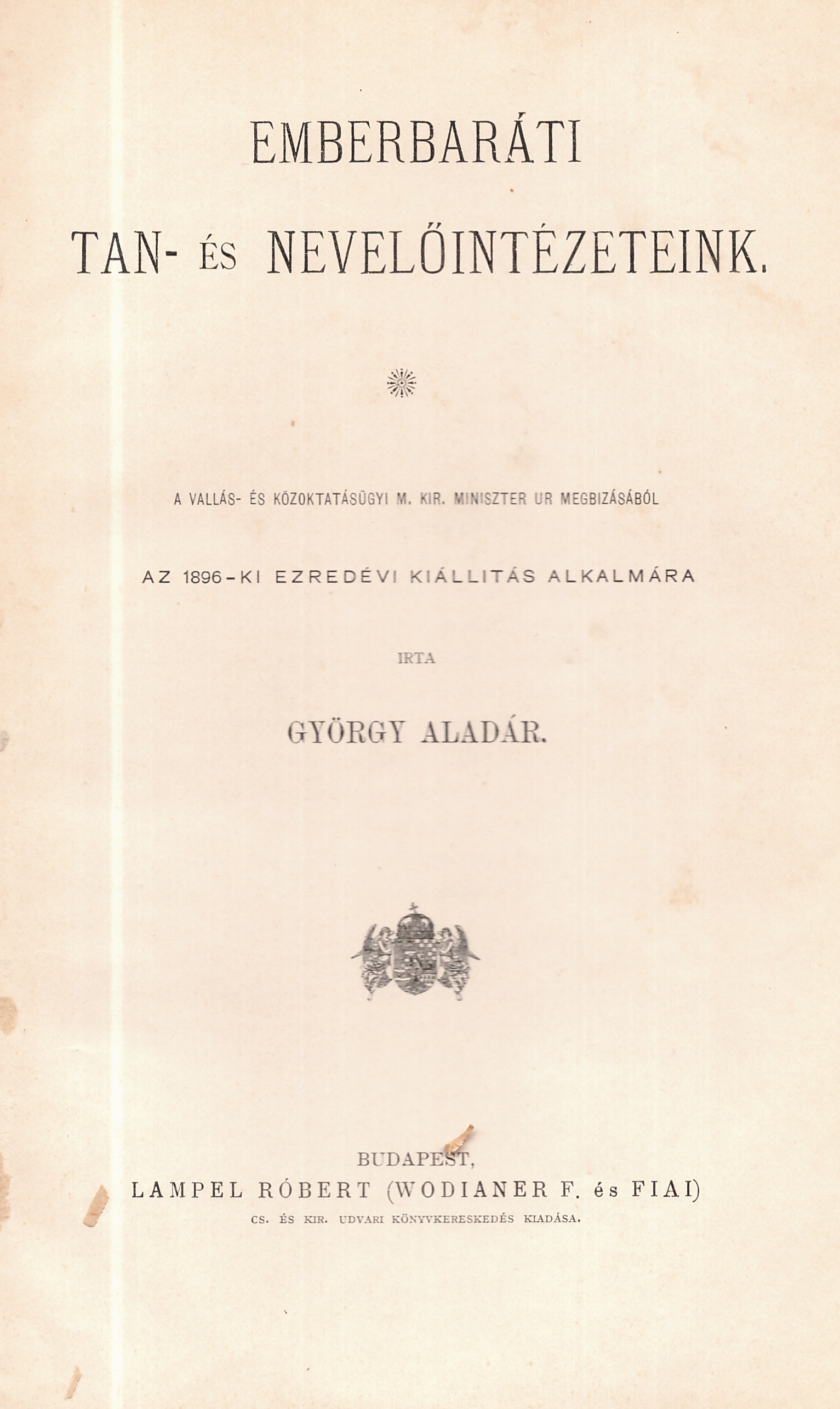 György Aladár (1844-1906): Emberbaráti tan- és nevelőintézeteink (1896)